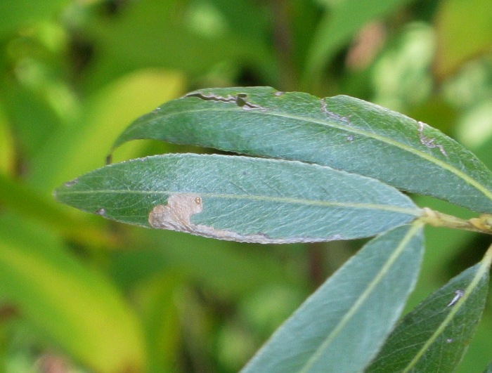 Mine von Stigmella vimineticola